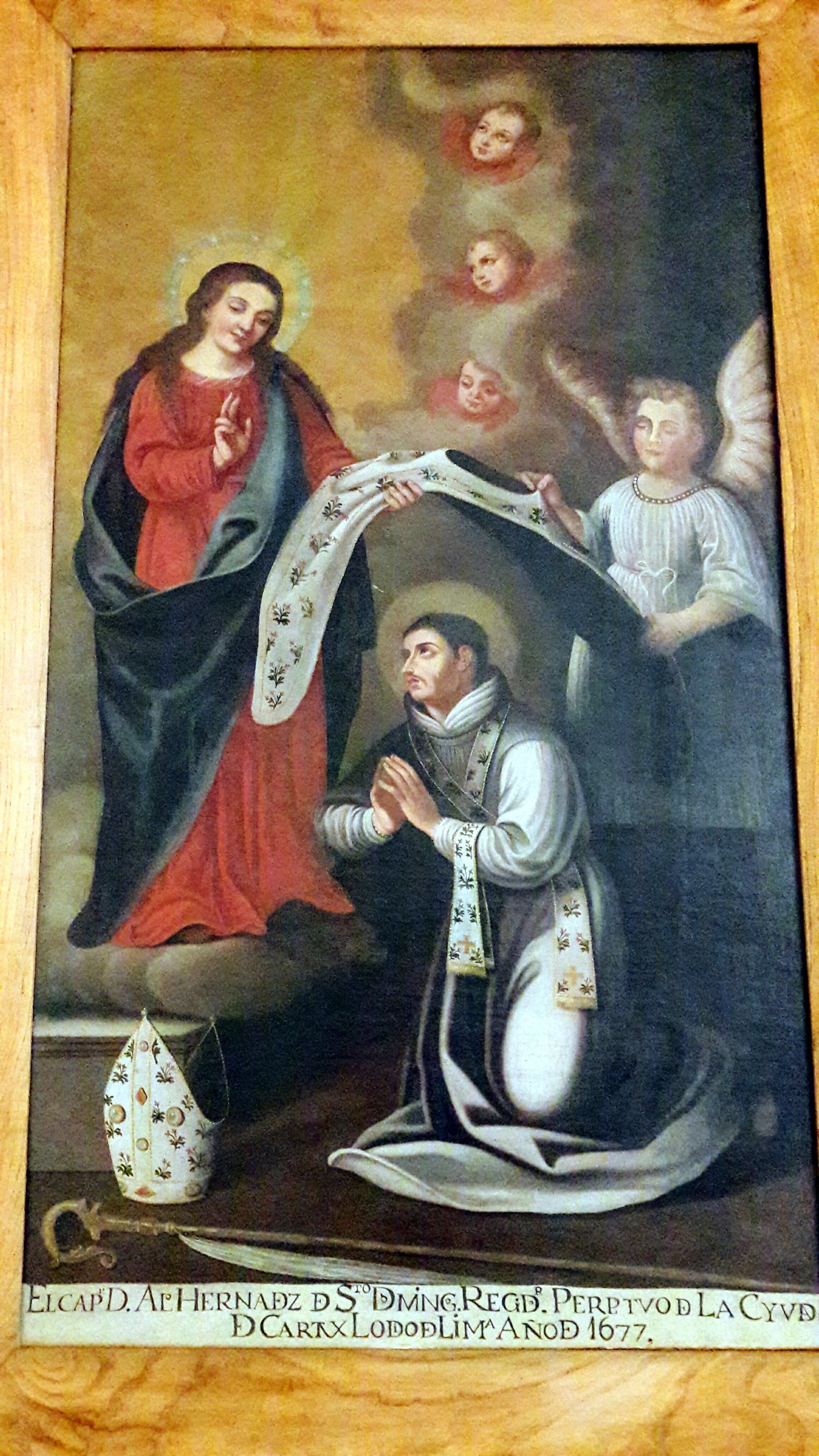 Autor anónimo. Siglo XVII